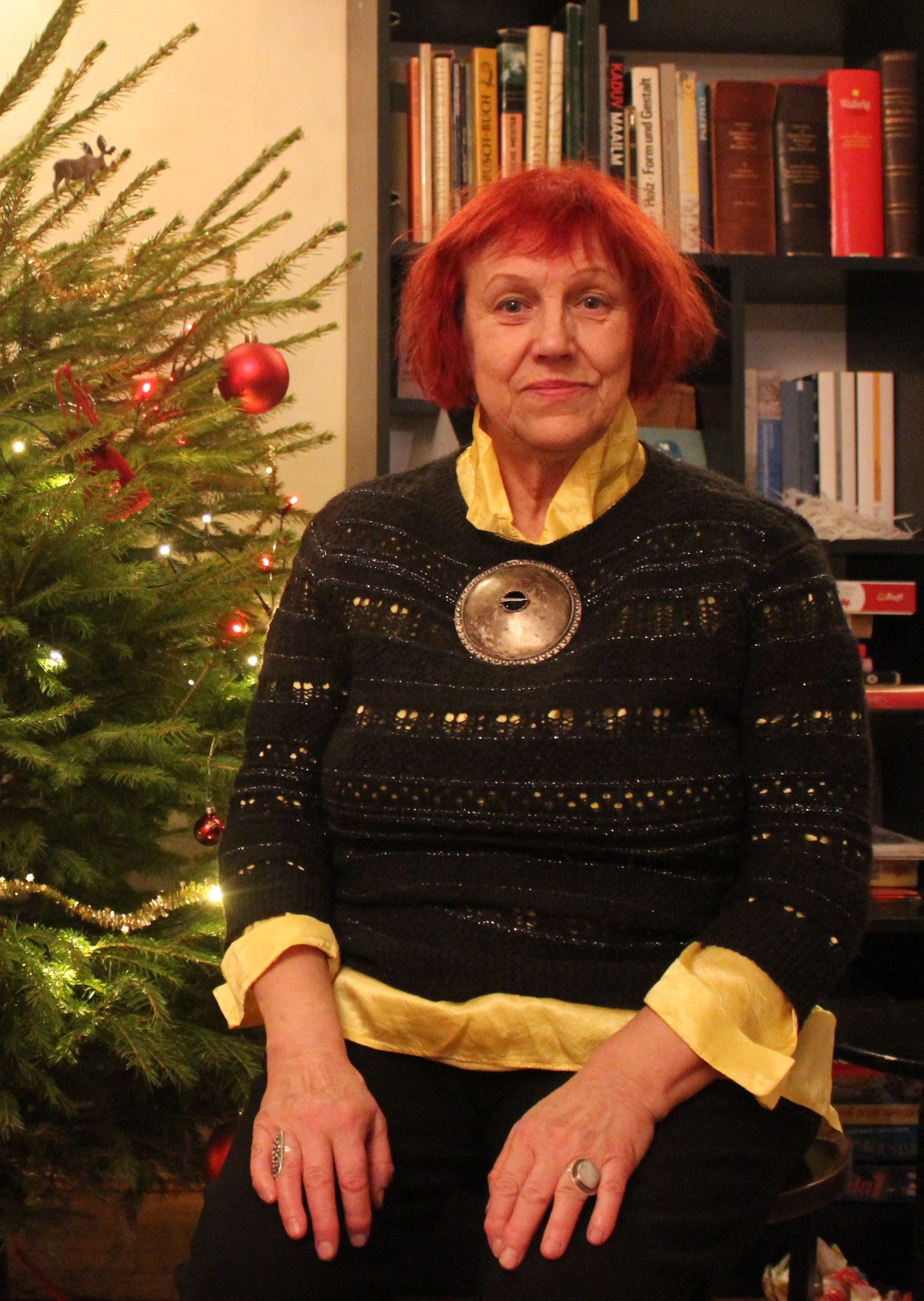 Kersti Karu, jõulud 2017